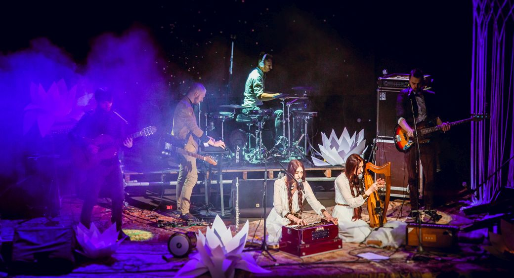 Мантра Дайвінг гурту Атмасфера у Львові